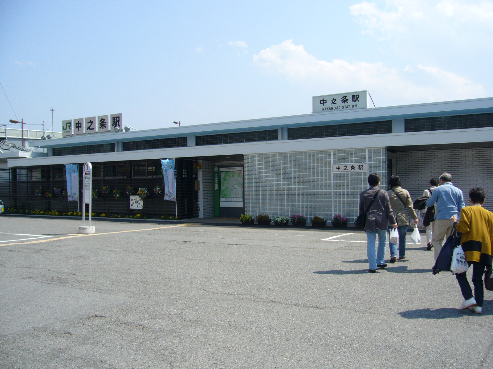 nakanojyo-station,nakanojyo-town,gunma-pref.,japan